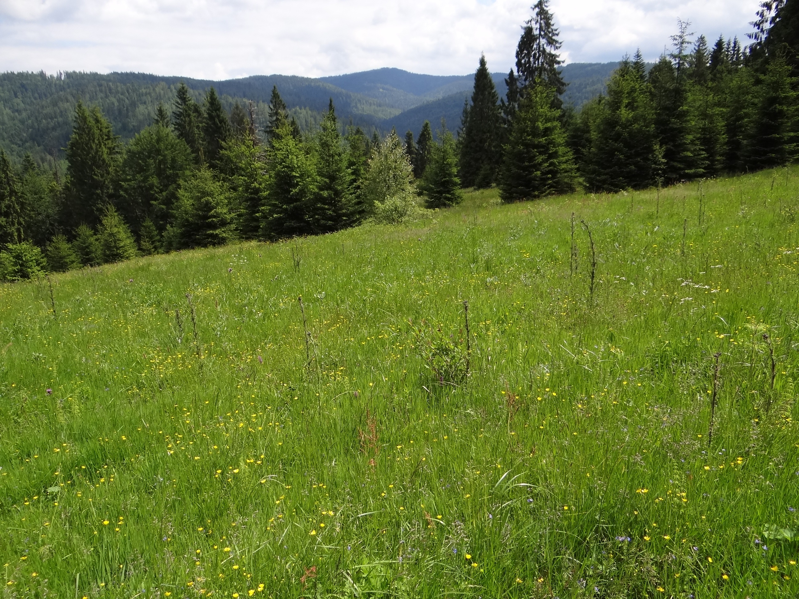 Polana Rożnowa i widok na Turbacz